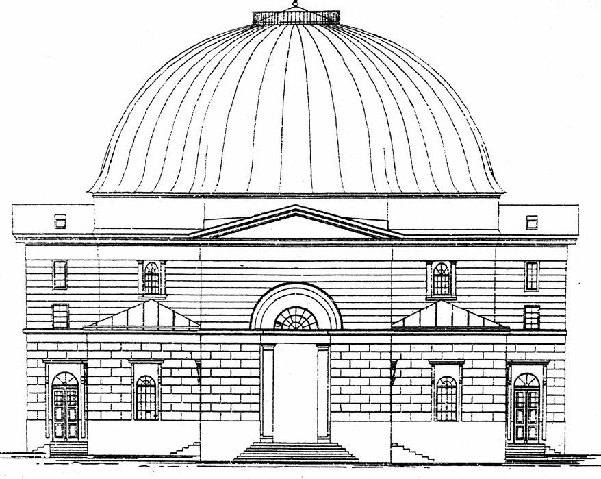 Проект фасаду синагоги Темпль у Львові, збудованої 1840-х роках. Автор проекту ймовірно Іван Левицький.